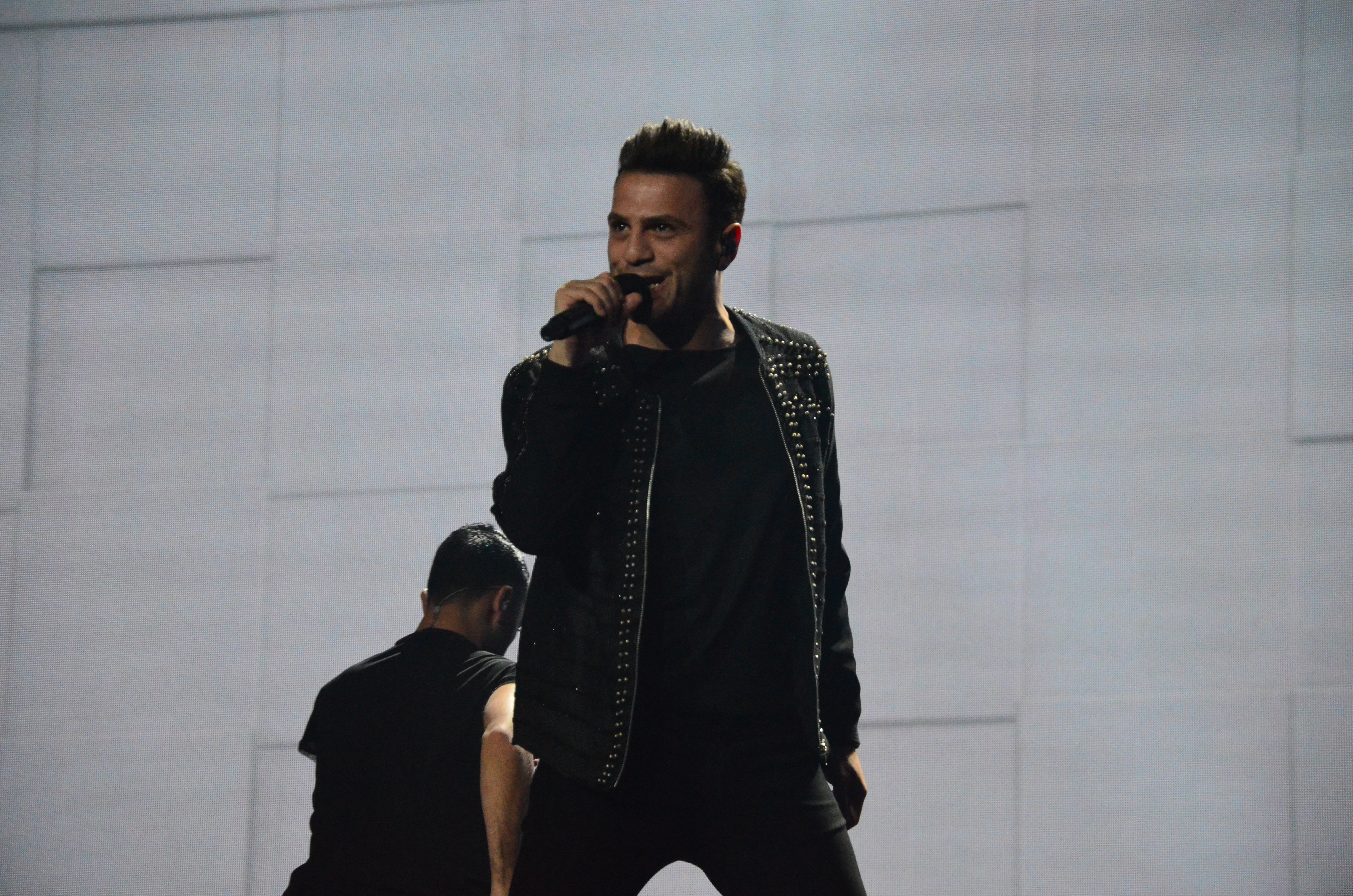 The making of this file was supported by Wikimedia Ukraine.